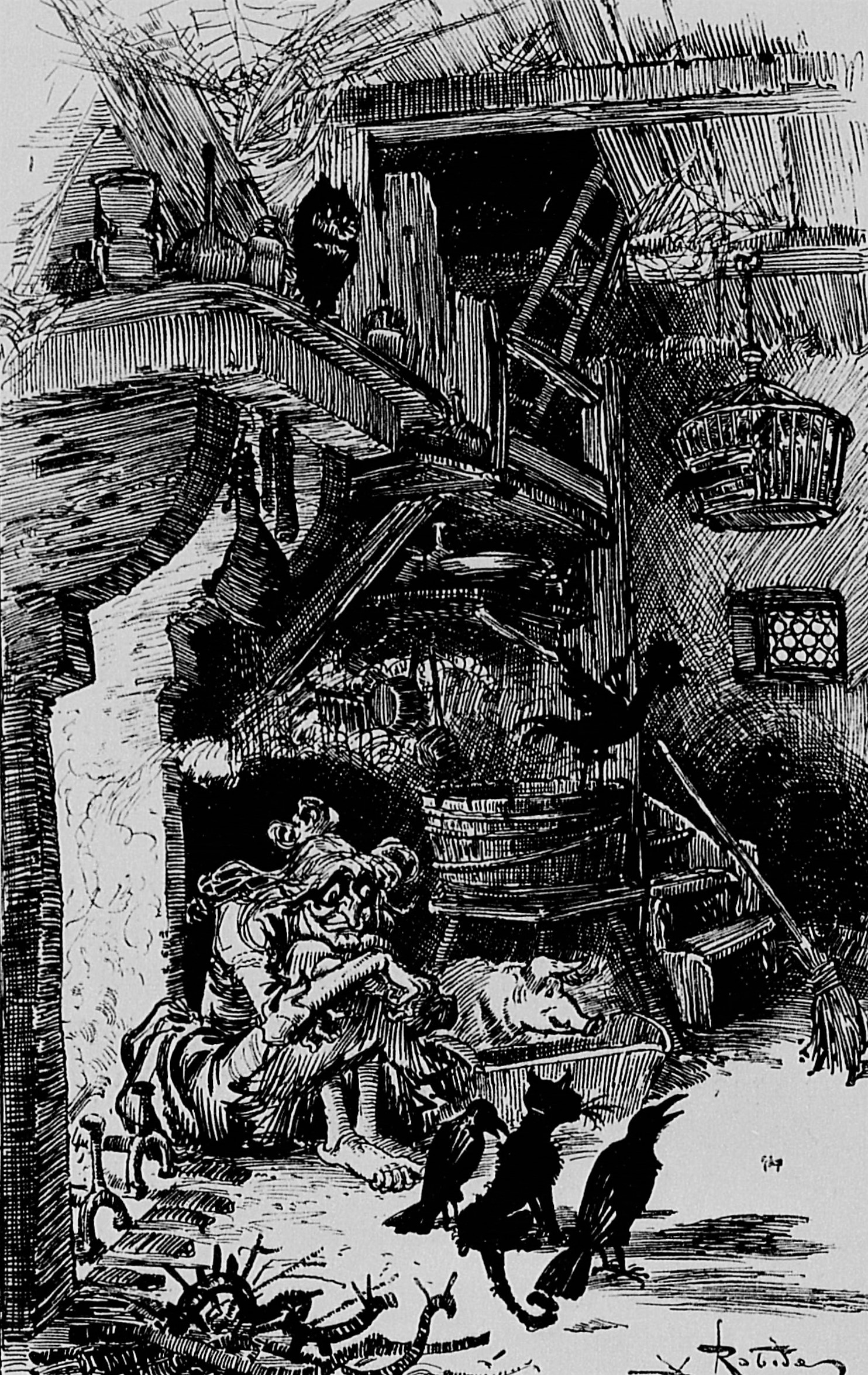 Illustration du Tiers Livre de François Rabelais, illustré pour une édition des Œuvres complètes en deux volumes par la Librairie illustrée en 1886.